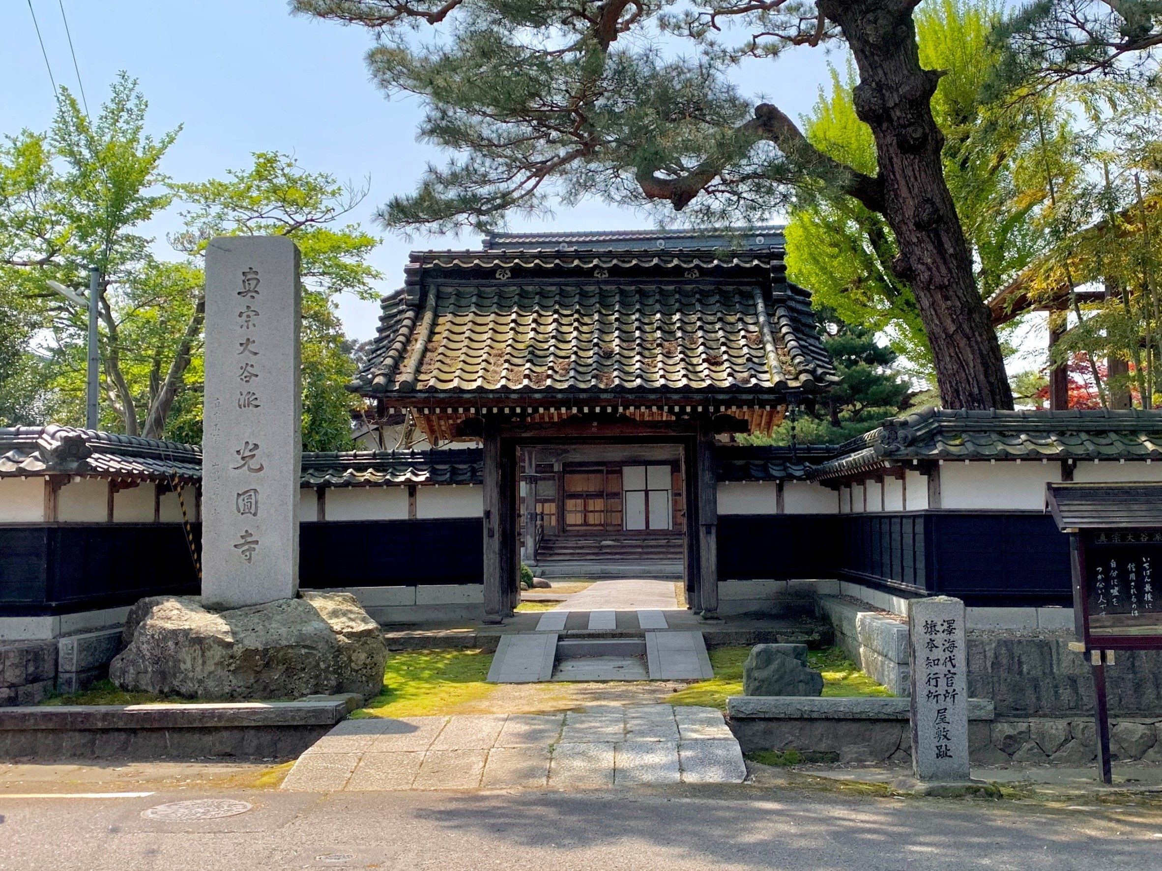 沢海の真宗大谷派 光圓寺（2020年5月）